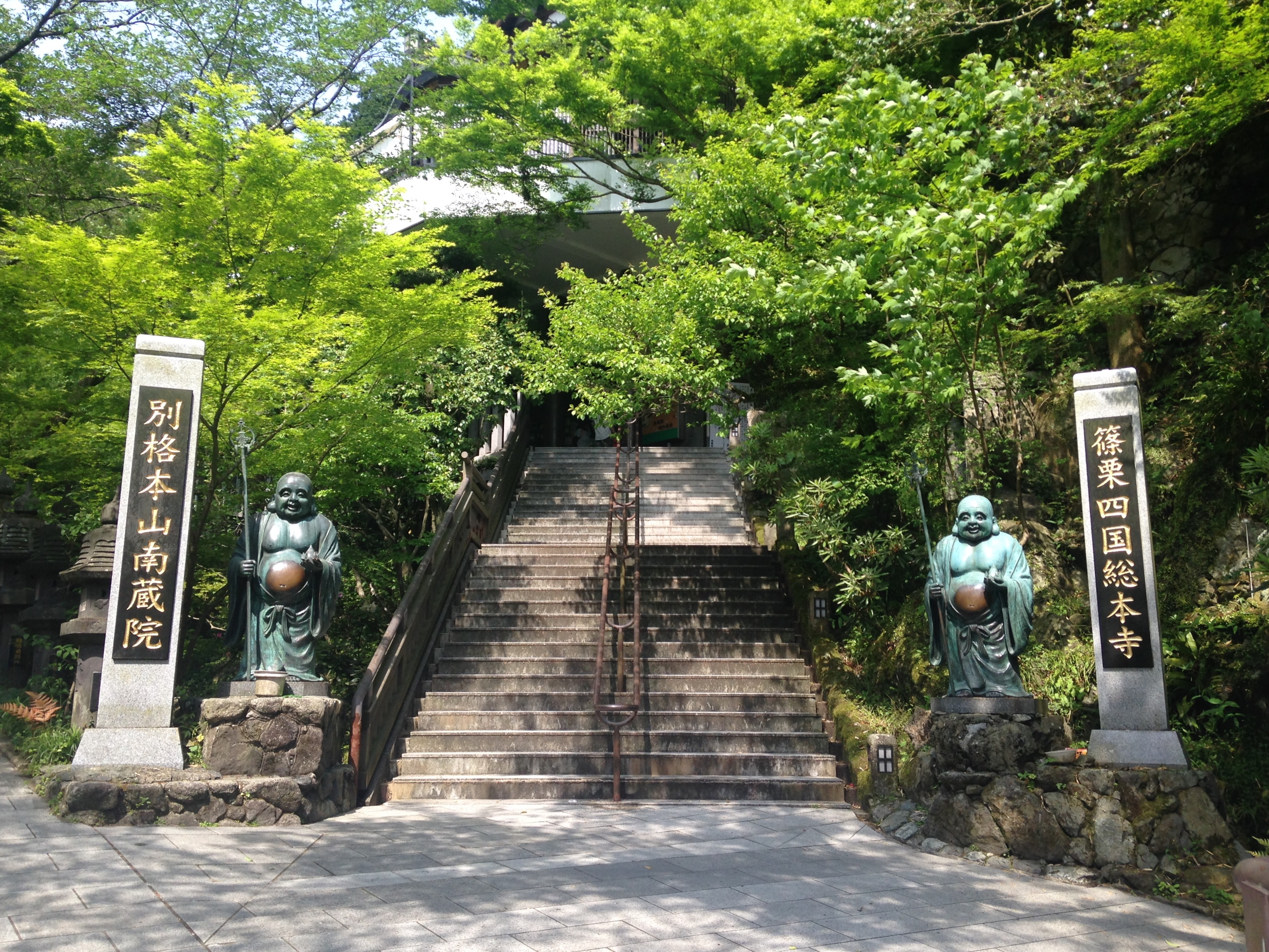 篠栗四国八十八箇所・南蔵院の山門